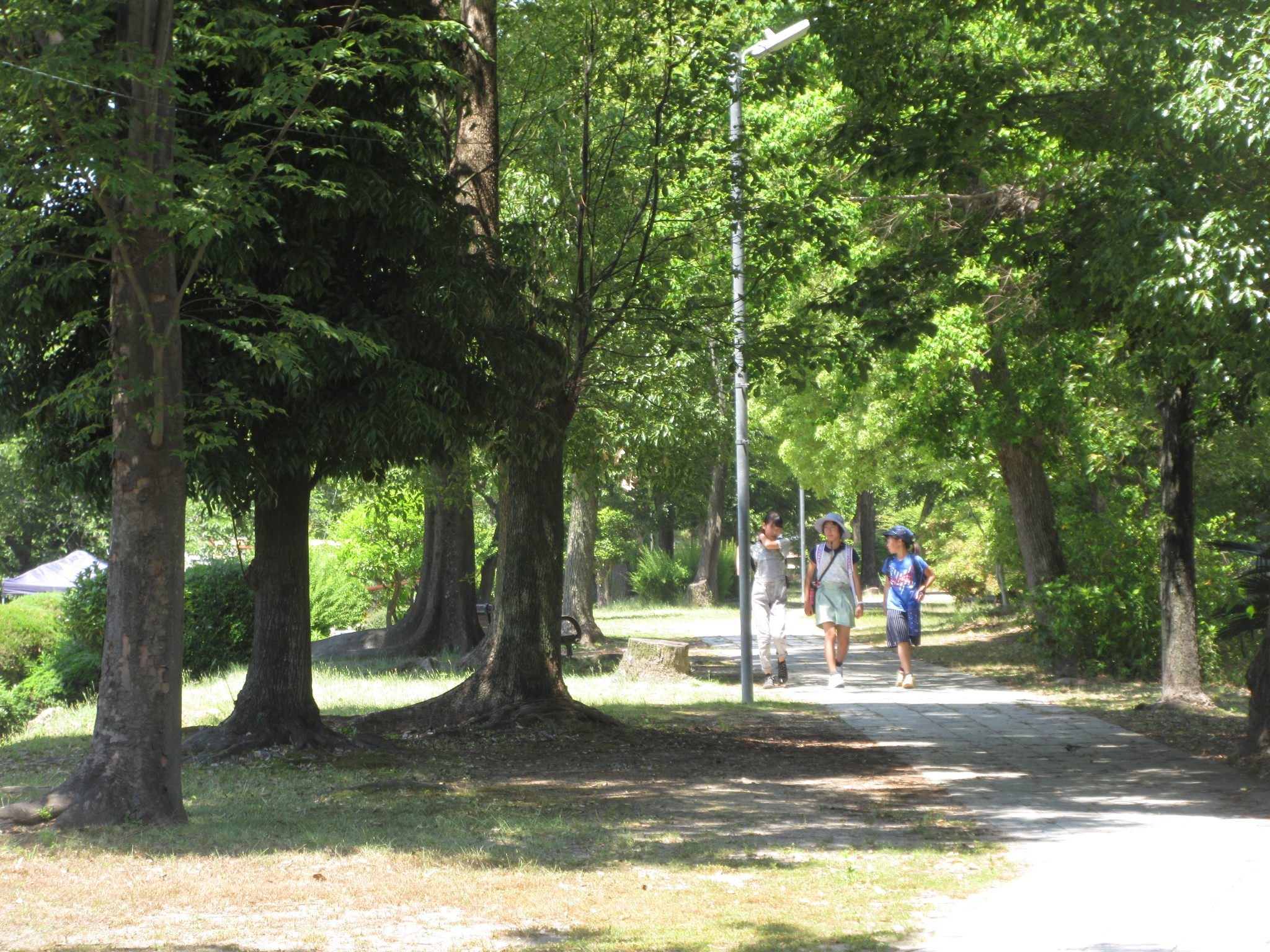 柿田川緑道（岡崎市城北町）